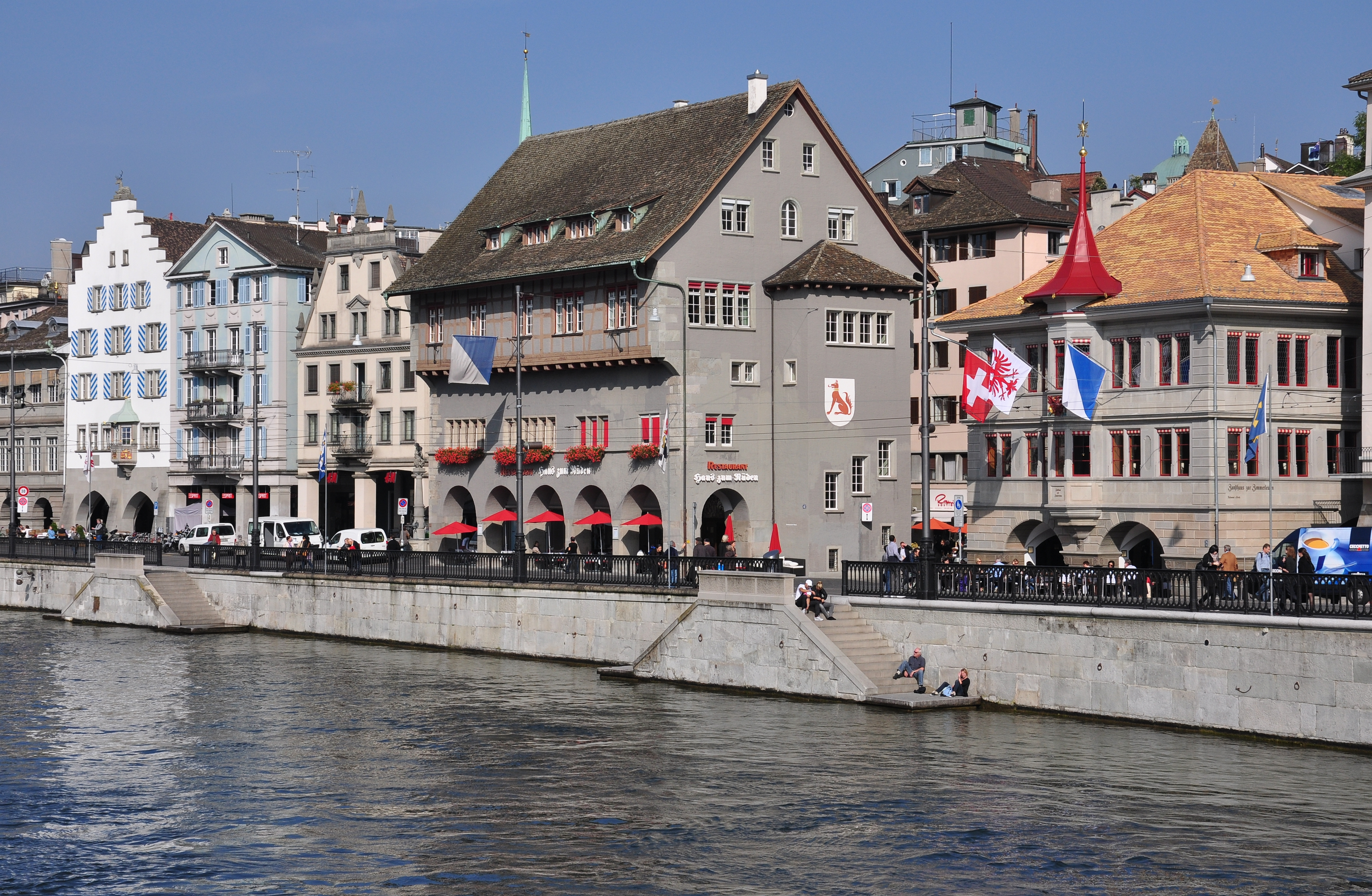 Zunfthaus zur Haue, Haus zum Rüden and Zunfthaus zur Zimmerleuten – rebuilt and newly inaugurated in October 2010 – at Limmatquai in Zürich (Switzerland), as seen from Münsterbrücke towards Münsterhof.